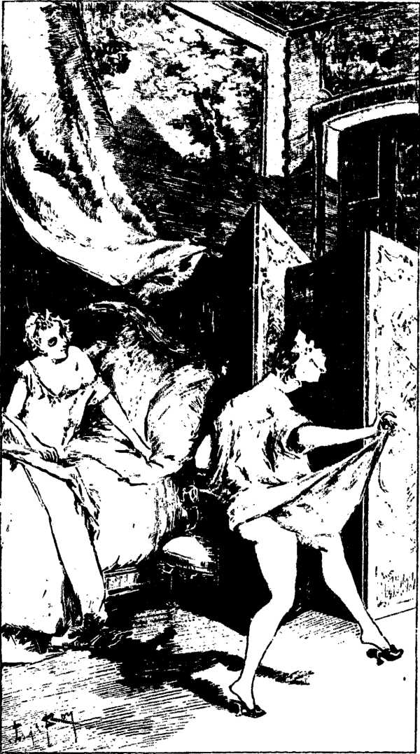 Lady Roxana